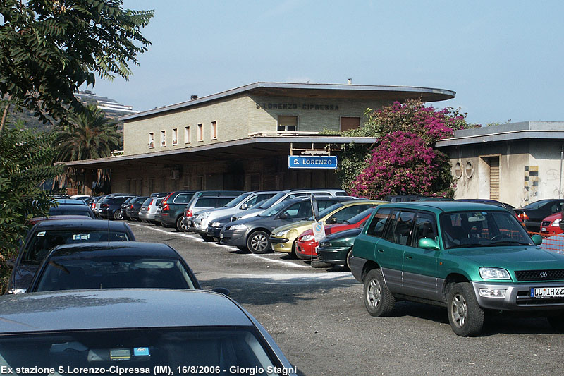 Ex stazione ferroviaria di San Lorenzo-Cipressa.